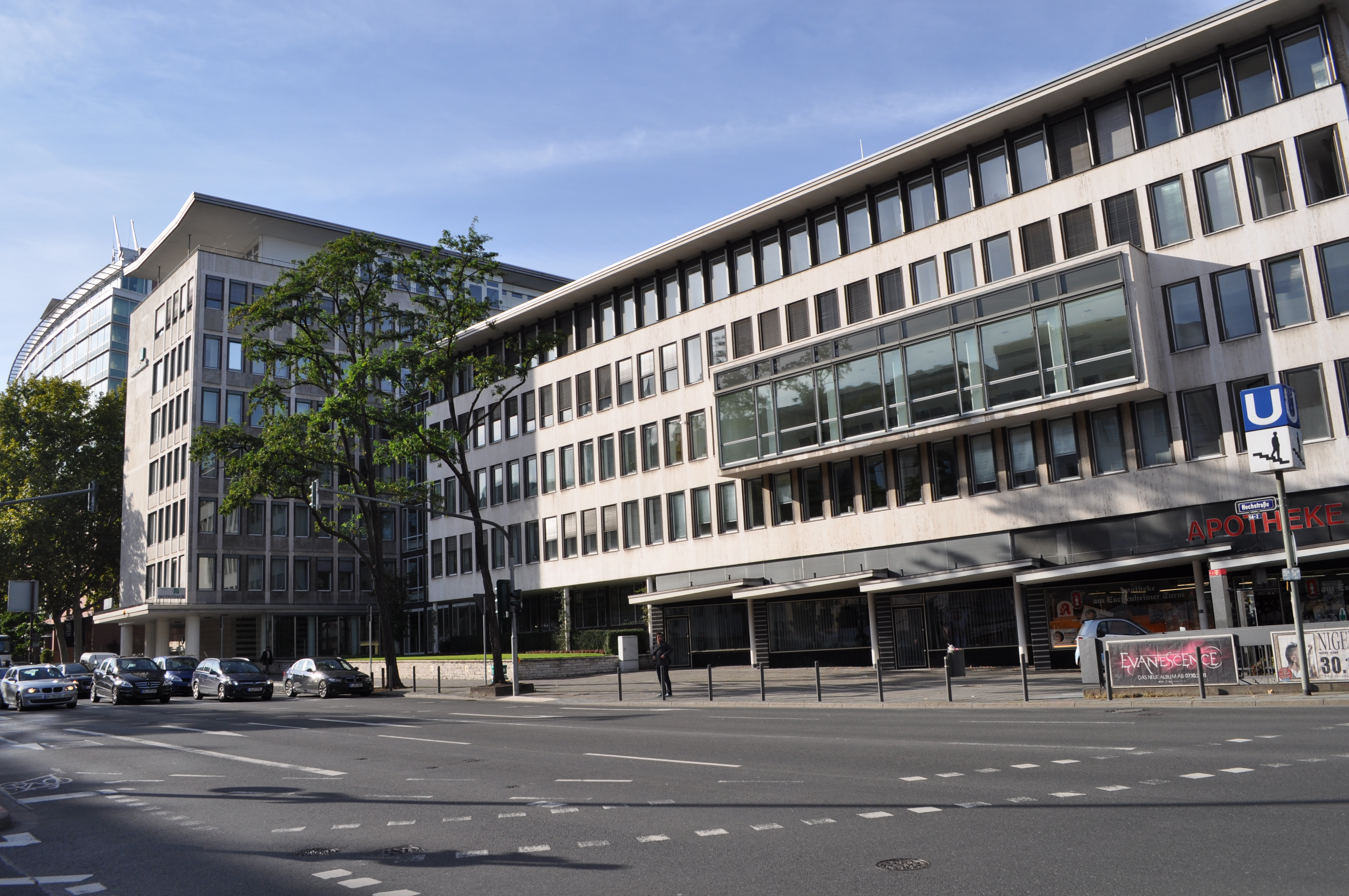 Denkmalgeschütztes Gebäude der Rentenbank in Frankfurt